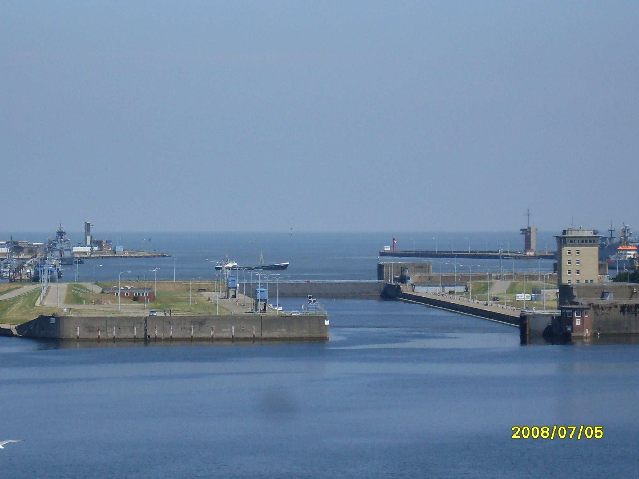 Wilhelmshaven